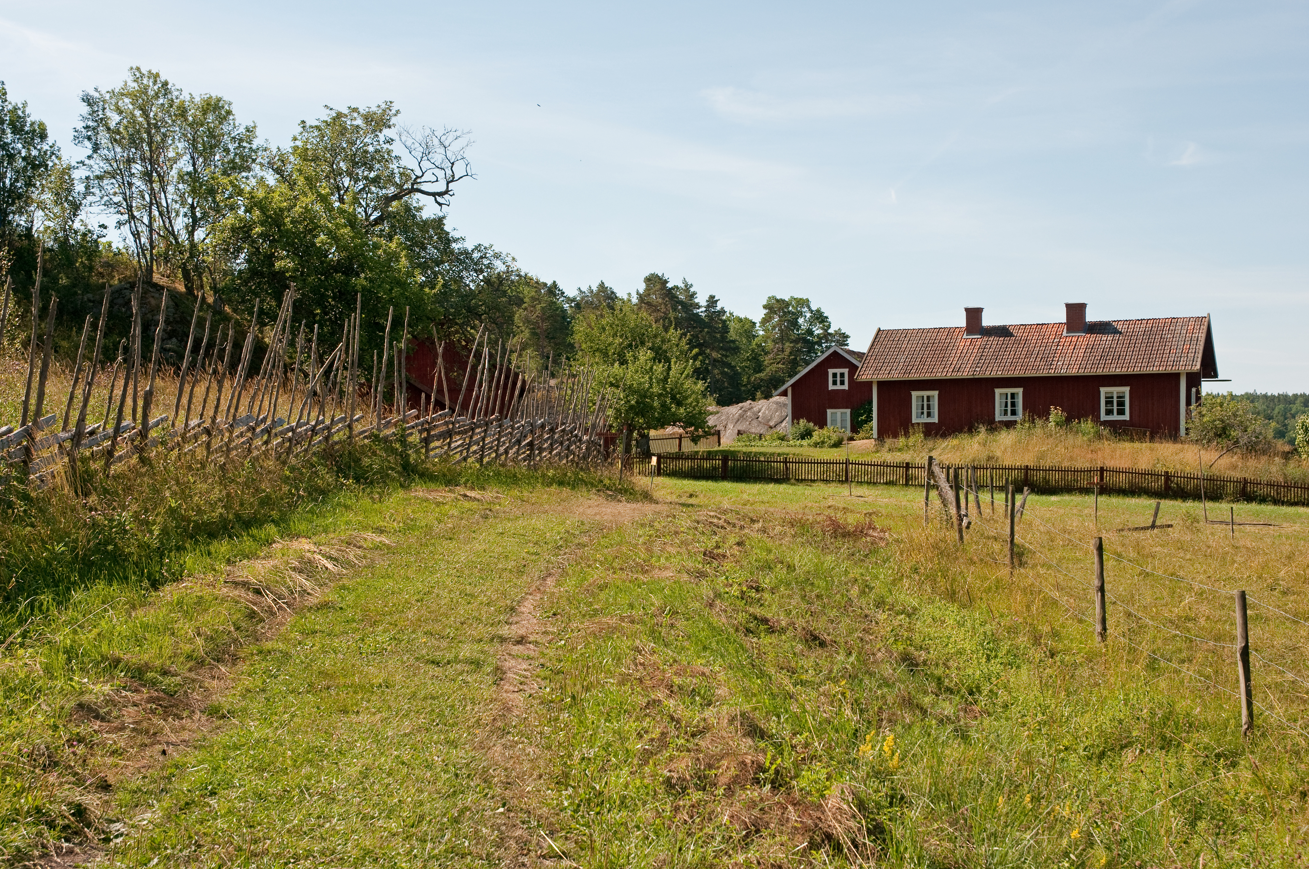 Nynäs naturreservat vid Långmaren